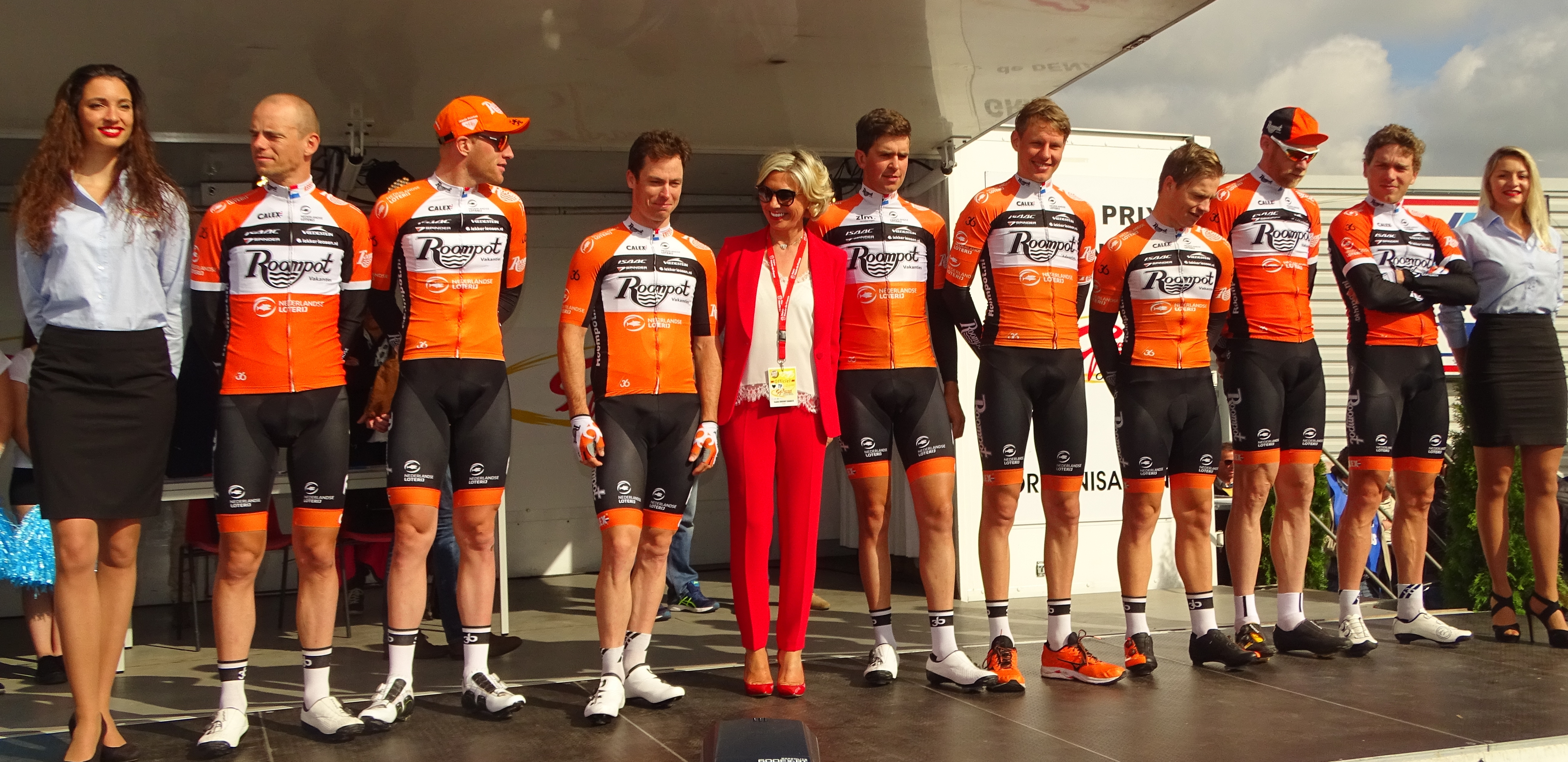 Reportage réalisé le jeudi 13 avril à l'occasion du départ et de l'arrivée du Grand Prix de Denain 2017 à Denain, Nord, Nord-Pas-de-Calais-Picardie, France.